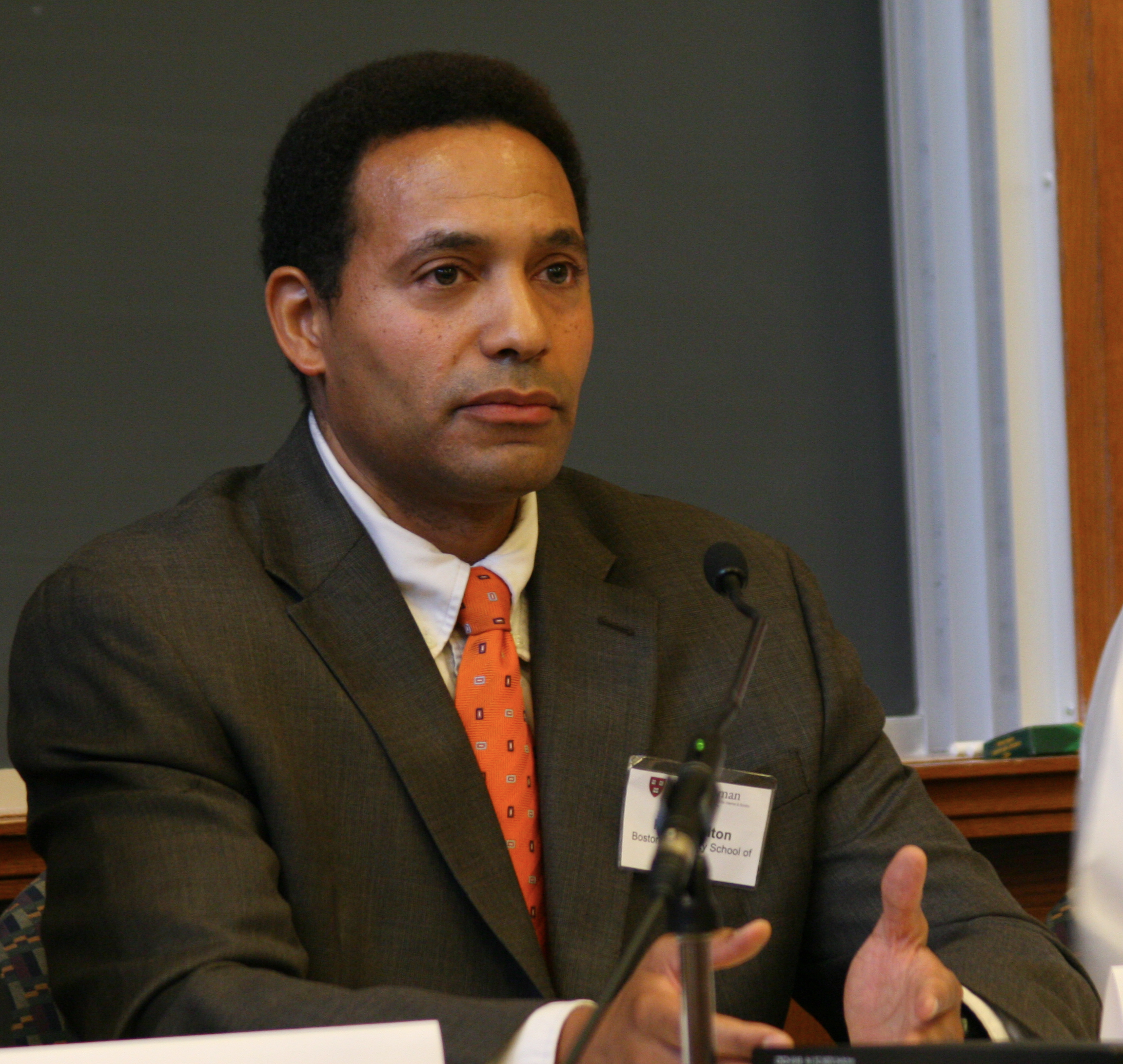 2008_09_13_us-vs-ms_180